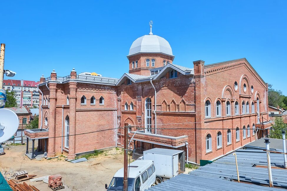 בית הכנסת בסרטוב, בשלבי בניה